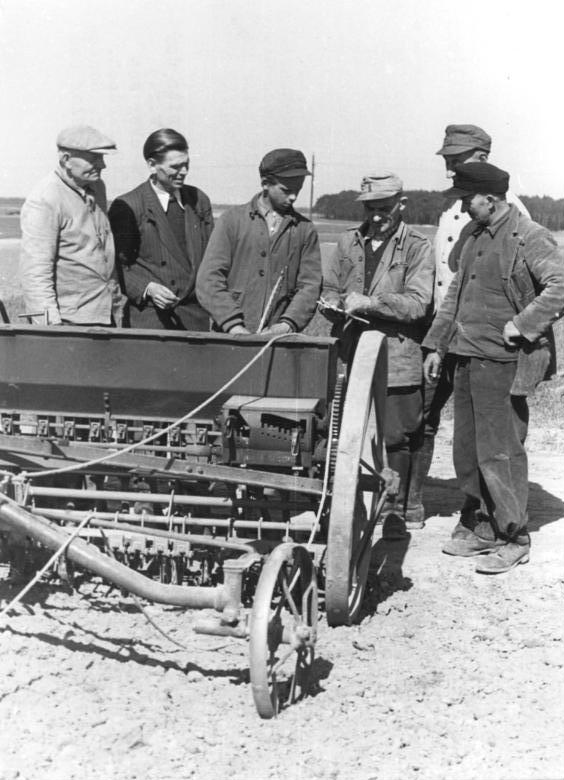 LPG Peritz, Planung der Aussaat Zentralbild Siegert-28.4.1954 Ehemalige Produktionsarbeiter gründeten Landwirtschaftliche Produktionsgenossenschaft. Am 27. April 1953 gründeten ehemalige Produktionsarbeiter aus dem Zellstoffwerk Gröditz und dem Stahl- und Walzwerk Gröditz die Landwirtschaftliche Produktionsgenossenschaft "1. Mai" in Peritz, Kreis Riesa. Die ehemaligen Produktionsarbeiter übernahmen zwei leerstehende Güter des Ortes und begannen mit der Arbeit. Die reaktionären Kräfte des Dorfes betrachteten dies als ein Experiment und prophezeiten in spätestens einem Jahr den Ruin dieser LPG. Doch die jetzigen Genossenschaftsbauern liessen sich nicht beirren und erzielten bei ihrer Arbeit besonders gute Erfolge. UBz: Ganz besondere Hilfe leistete die MTS Wülknitz der jungen LPG. Der Agronom der MTS, Koll. Häusler, 2. v. r., bei einer Besprechnung mit Genossenschaftsbauern über den Einsatzu der Drillmaschine beim Drillen von Ölfaserleinen, (v.l.n.r) August Tuhnicht, Hugo Pohl, Heinz Baeger, Genossenschaftsvorsitzender Julius Zebisch, Agronom Häusler und Feldbaubrigadier Wisnofski.